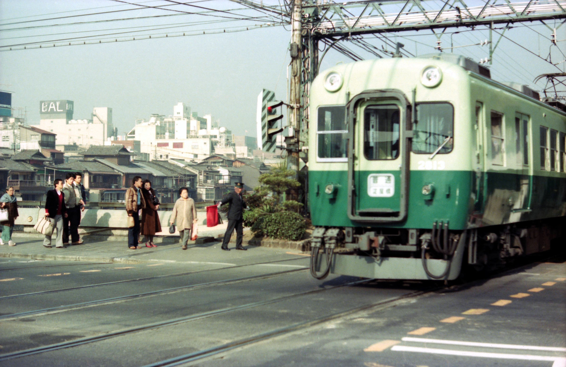 京阪 四条交差点（踏切）Ｓ５６頃